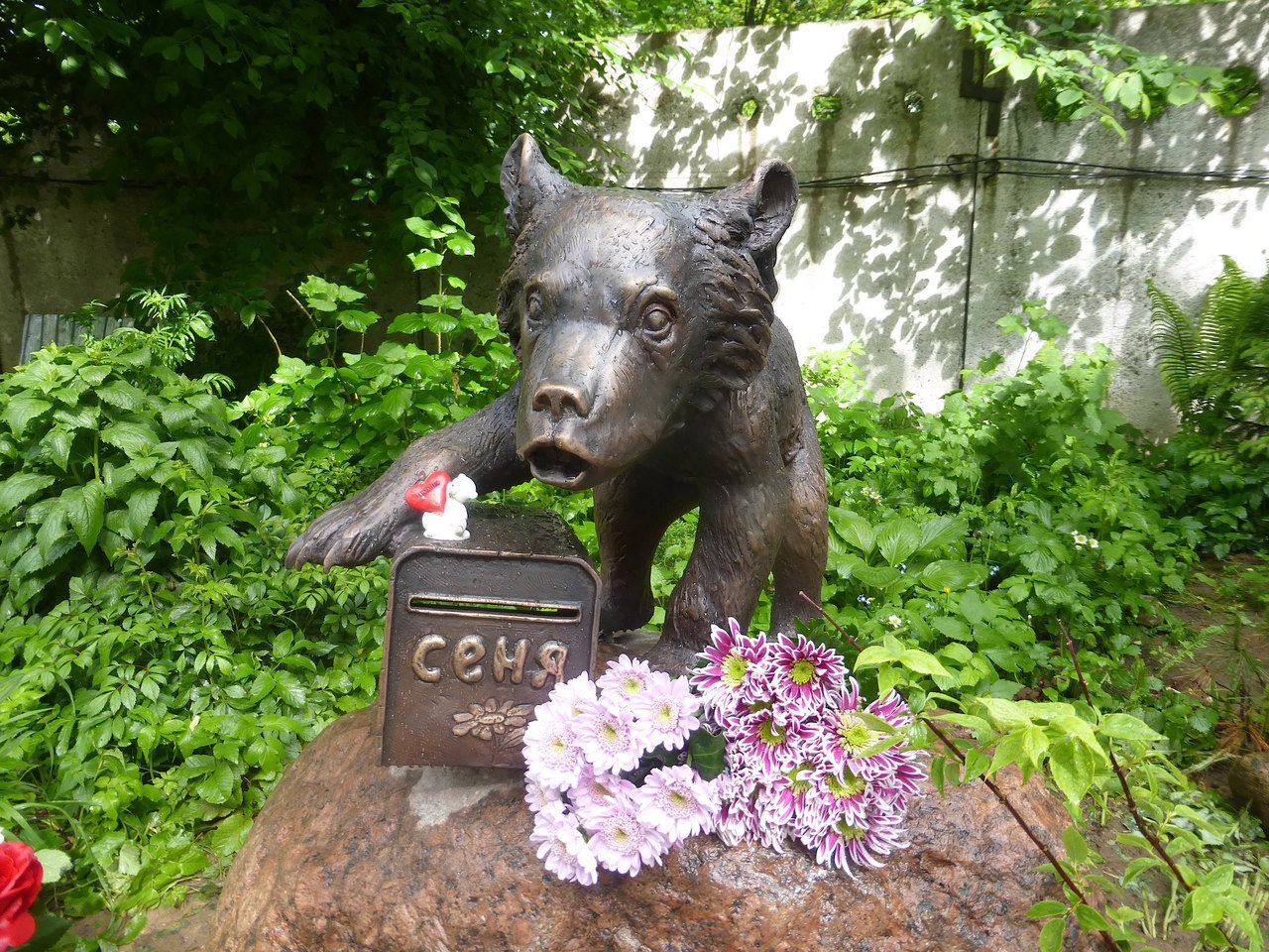 Бронзовая скульптура медведю Сене. РКЦентр «Велес» деревня Рапполово Ленинградская область